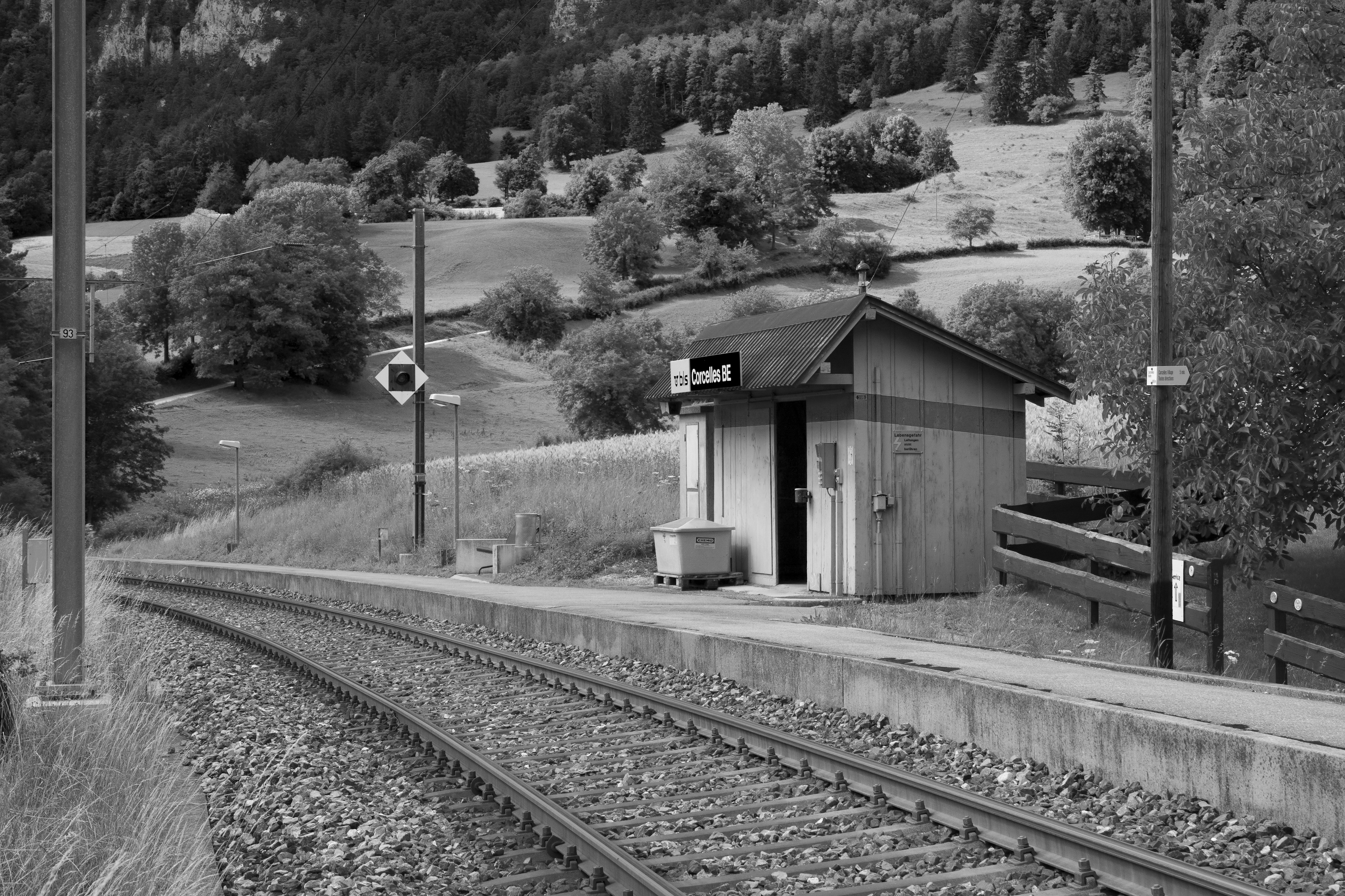 Der Bahnhof Corcelles, Schweiz